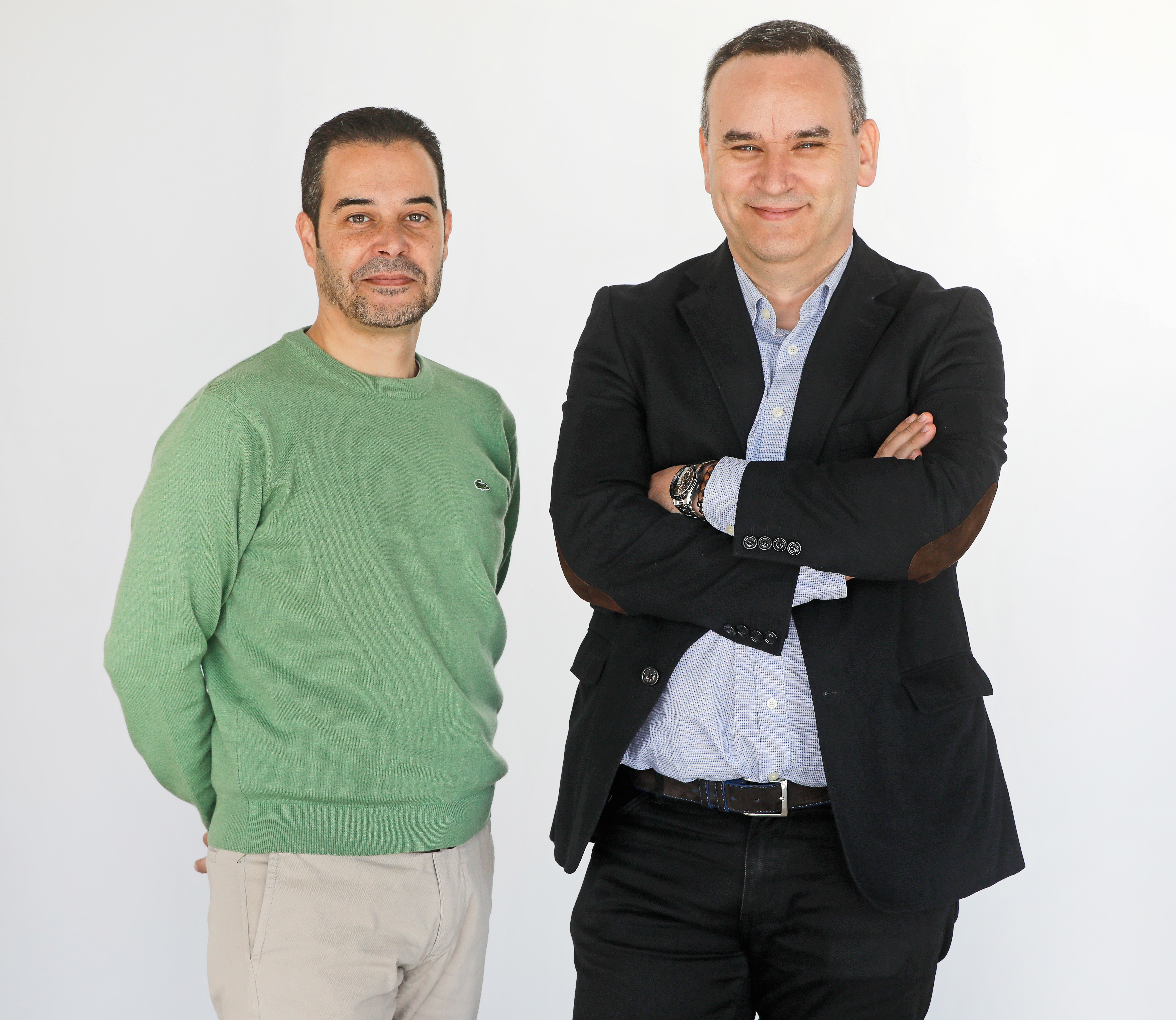 Ricardo Margalejo y Antonio Picazo, socis fundadors de Gana Energía.